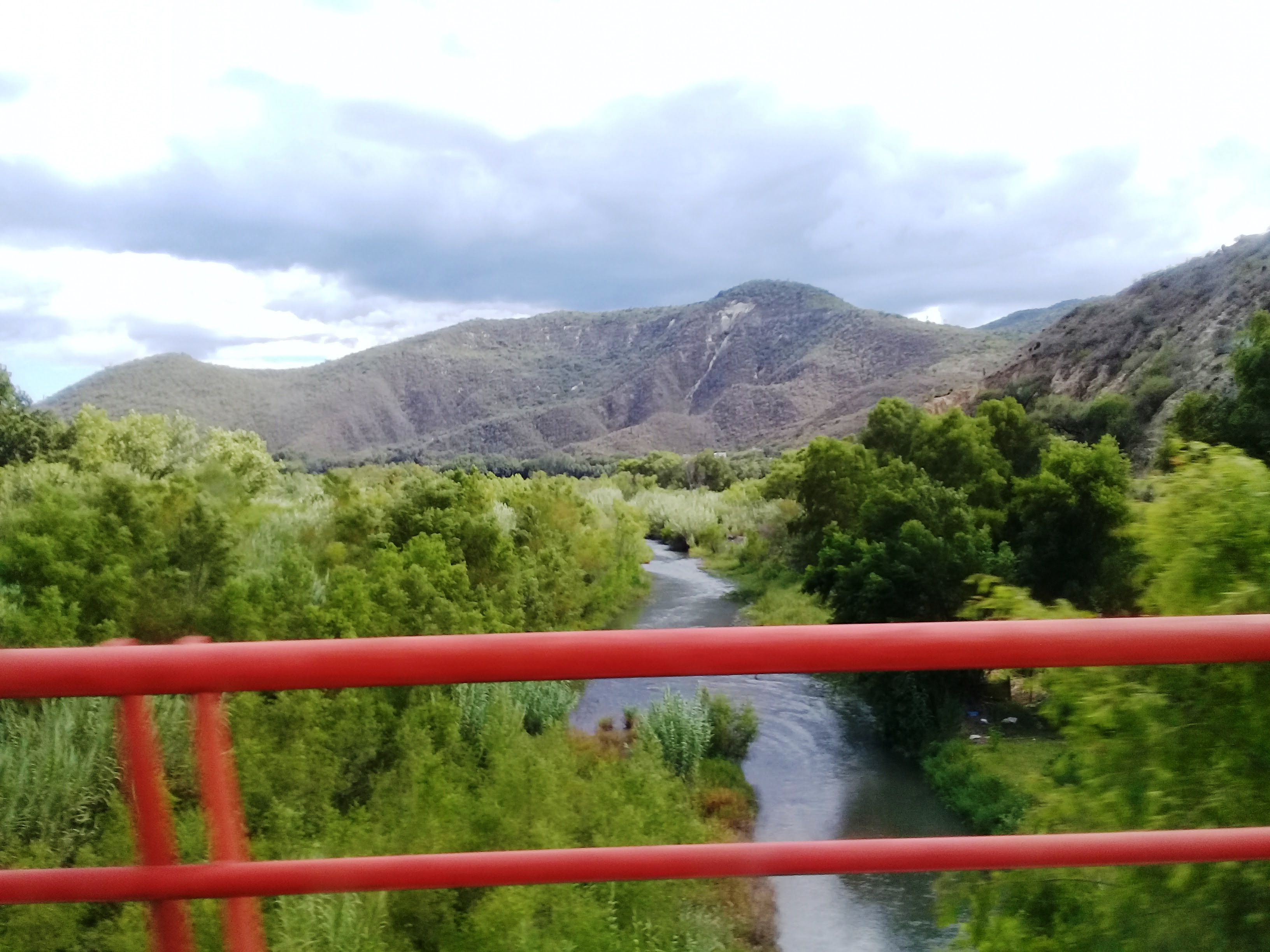 Camino a Metztitlán. 001